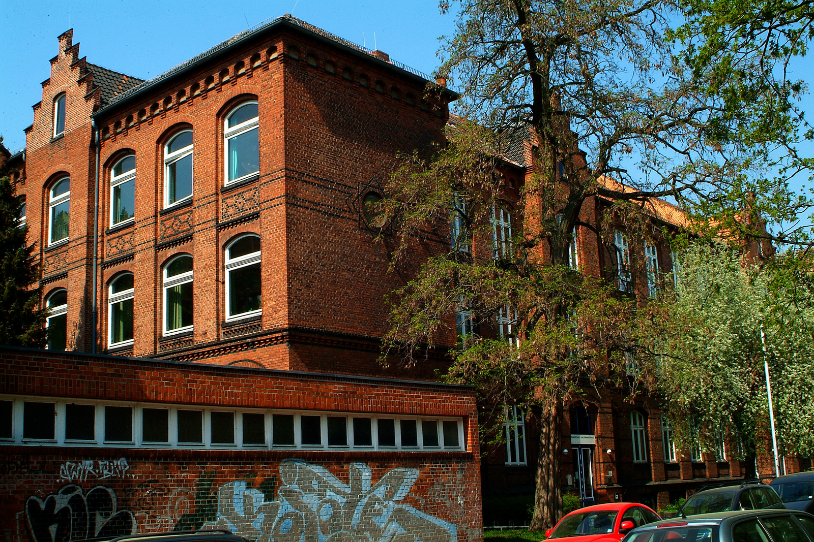 Sie haben ein besseres Bild? Sogar ein historisches Dokument als Bild(ungsförderung)? Zeigen Sie' s uns. Stiften Sie es hier - ihren Kindern, unseren Enkeln, allen Menschen.